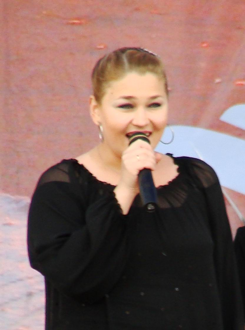 Дочь супругов Тихановича Александра Григорьевича и Поплавской Ядвиги Константиновны (экс-участников ансамбля "Верасы" (г.Минск))Анастасия выступает, совместно с родителями, на Дне Рождения города Северодвинска и Дне ВМФ (празднуются в один день).